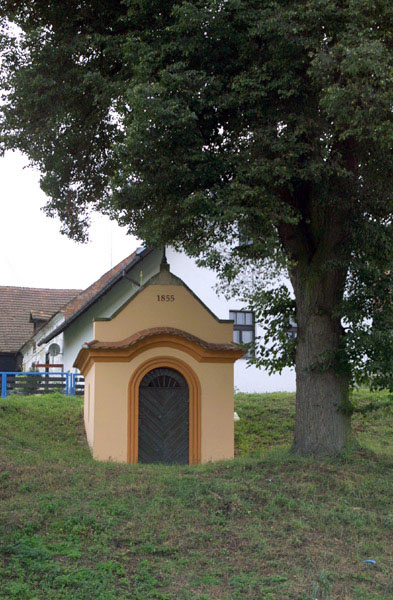 Česky: Kaplička ve svahu pod silnicí v Kočíně.